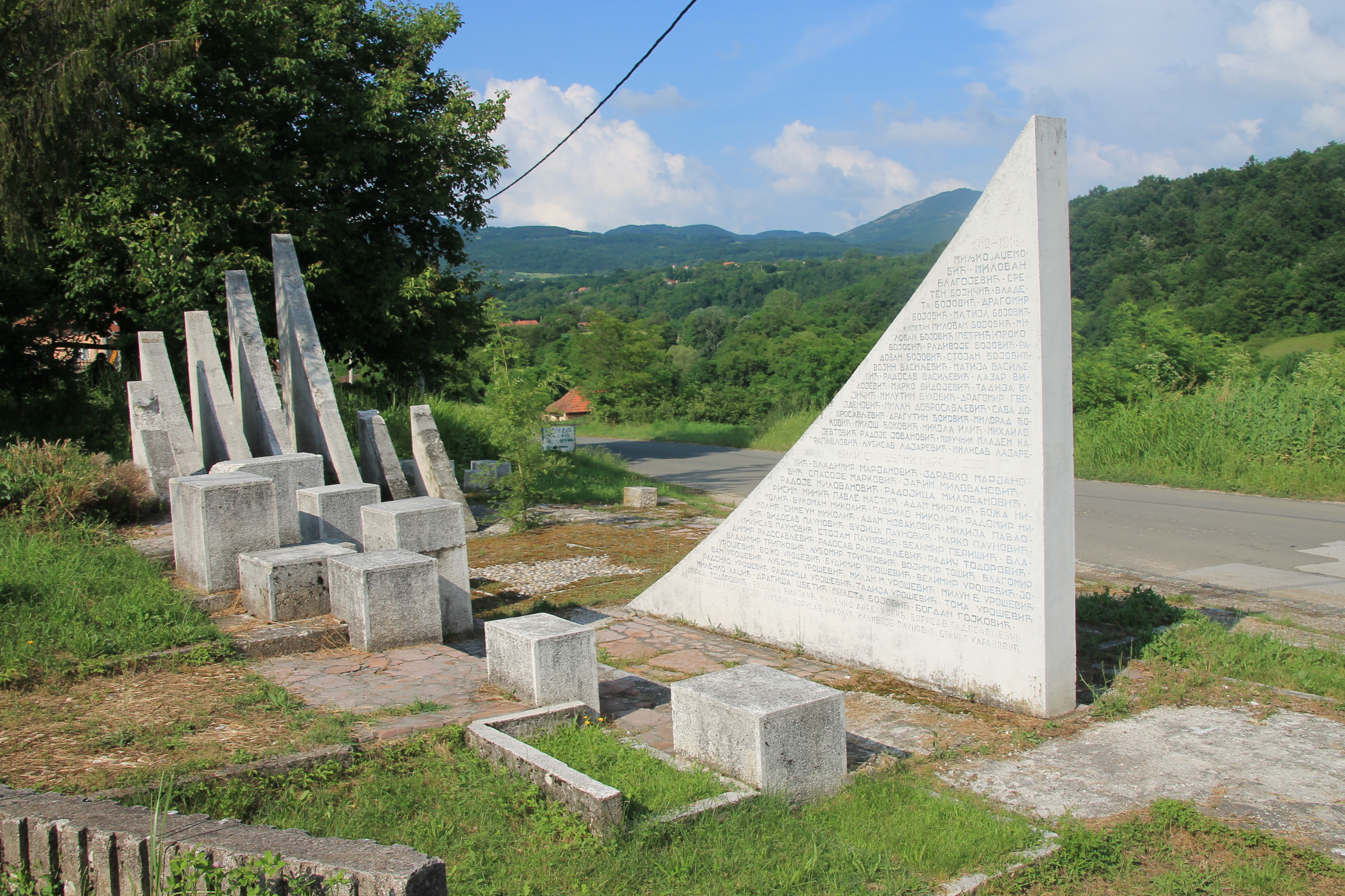 Spomenik NOB-a